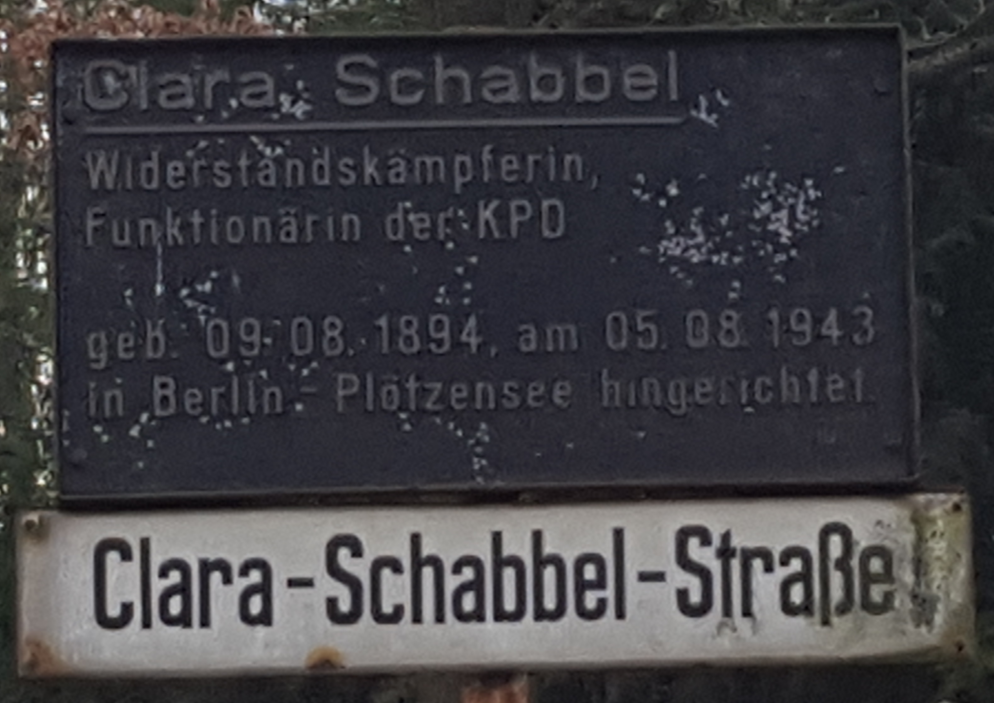 Gedenktafel an Clara Schabbel mit Straßenschild in Hennigsdorf aus den 1980er Jahren.